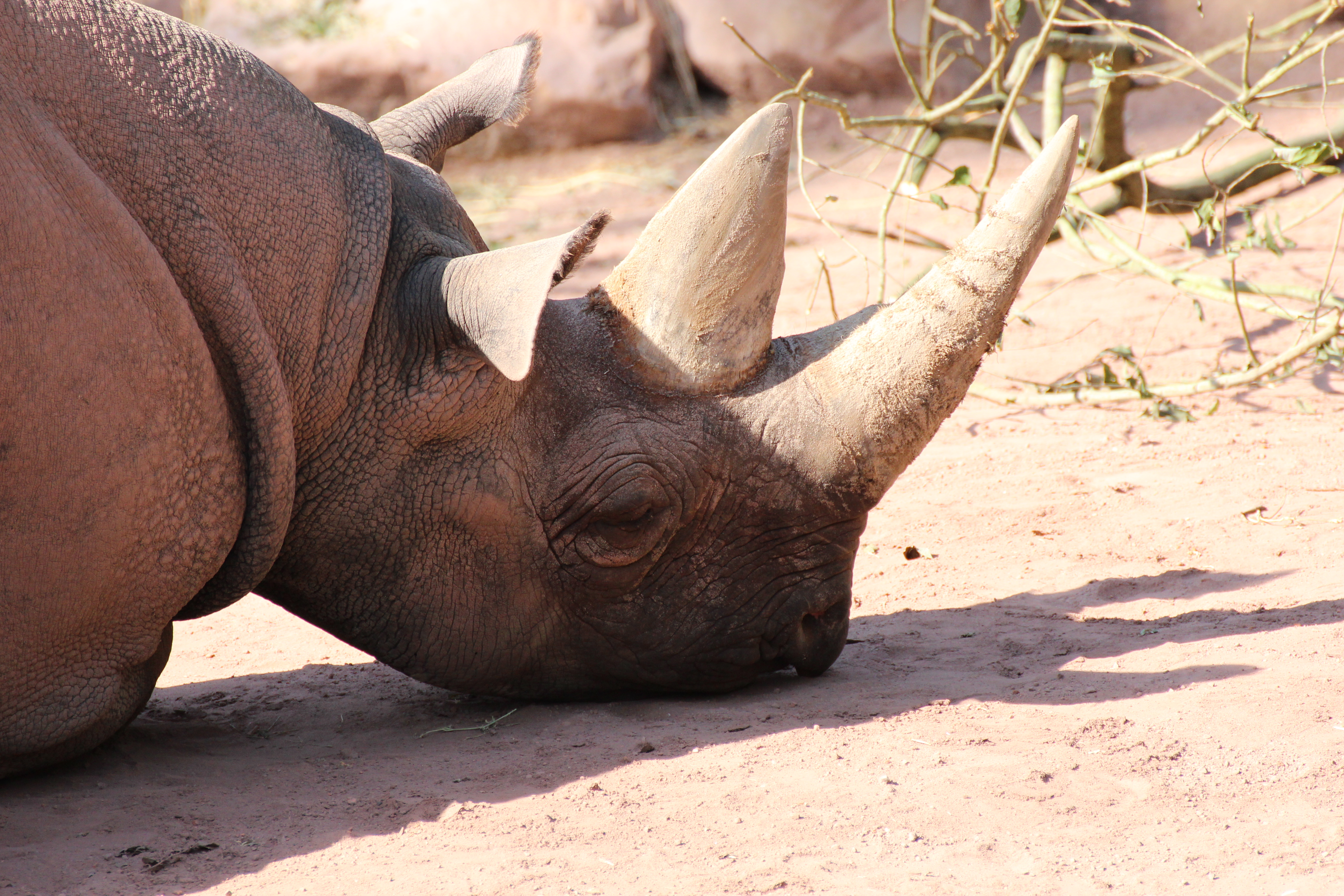 Nahansicht des Kopfes eines Spitzmaulnashorns (Diceros bicornis) im Zoo Hannover